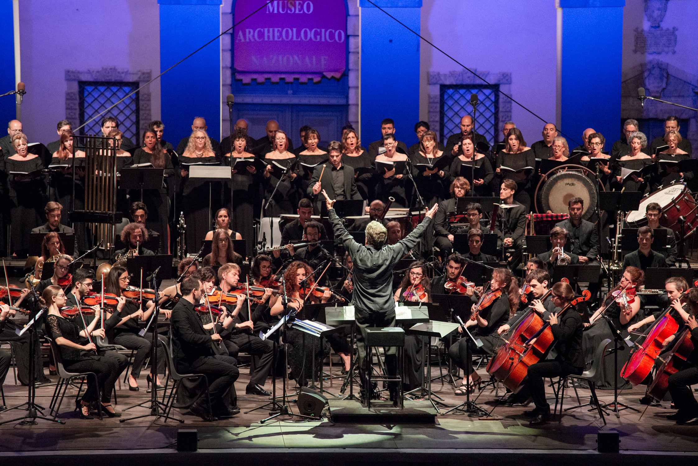 Esecuzione dell'Inno al Mittelfest nel 2019